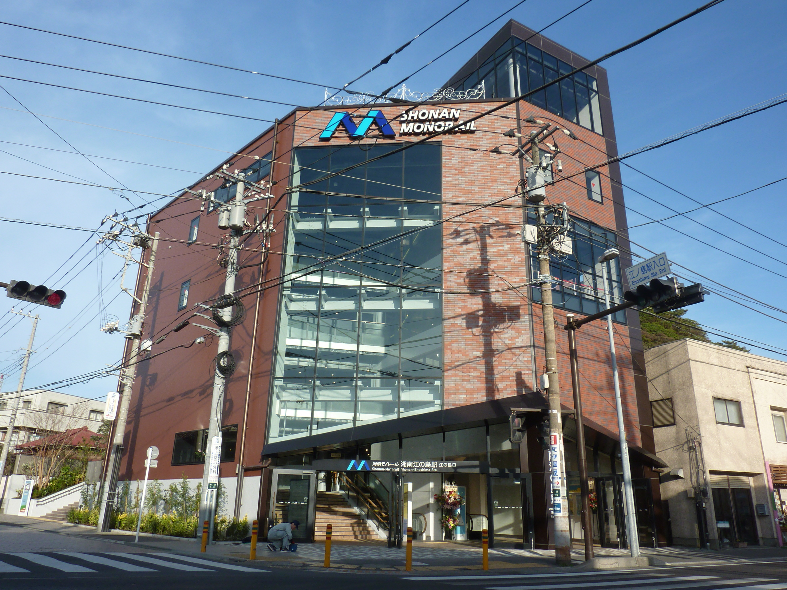 2018年に完成した湘南江の島駅の駅ビル。